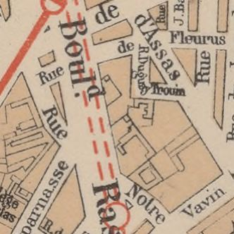 Emplacement de la rue Huysmans juste avant son ouverture. La situation est réalité théorique puisqu'à l'endroit où aboutit la rue, le boulevard n'a pas été bordé d'immeubles autres que ceux qui en font les coins.